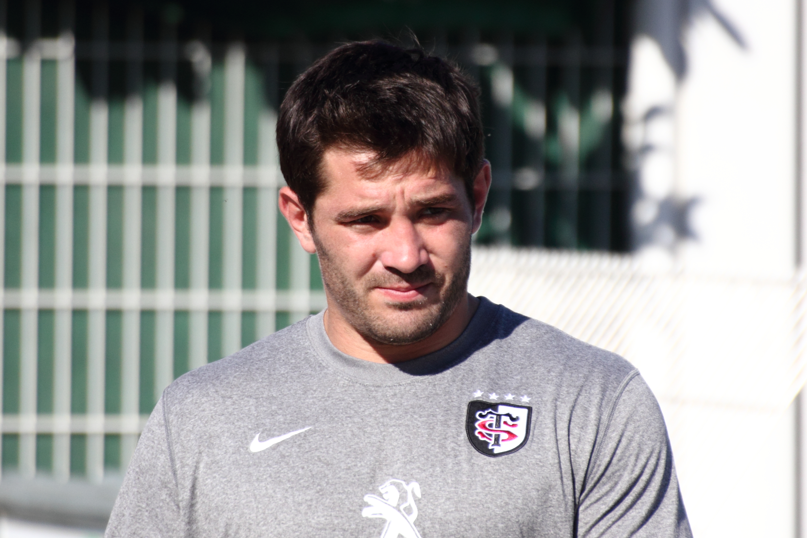 Florian Fritz à la fin de l'entrainement.